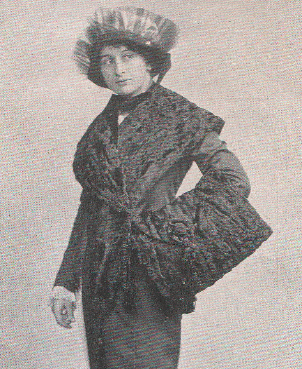 Oscar Kirsten, Pelzwaren-Konfektion, Leipzig, 1913-1914 (Katalog).